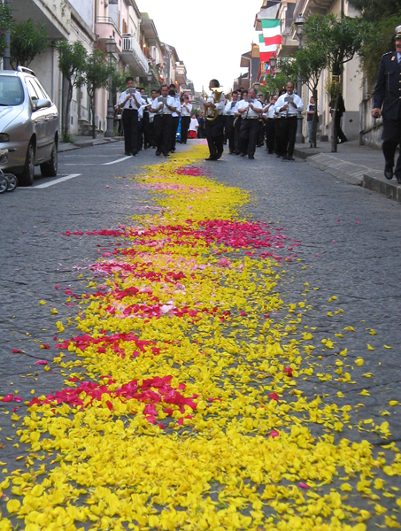 Processione del Corpus Domini - Zafferana Etnea (CT) - Foto D. Pennisi